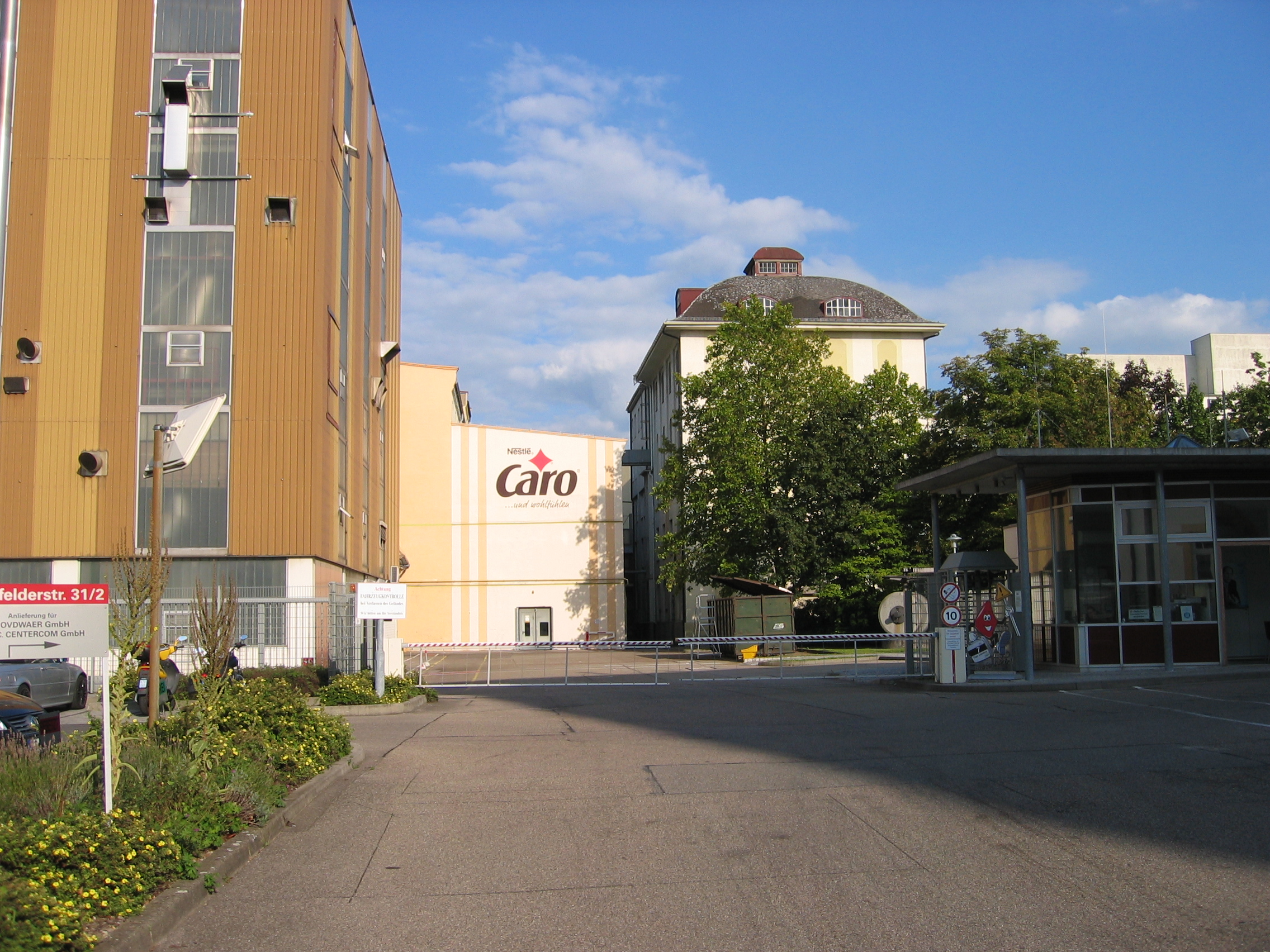 Caro-Kaffee Werk Ludwigsburg (Jahr 2015)